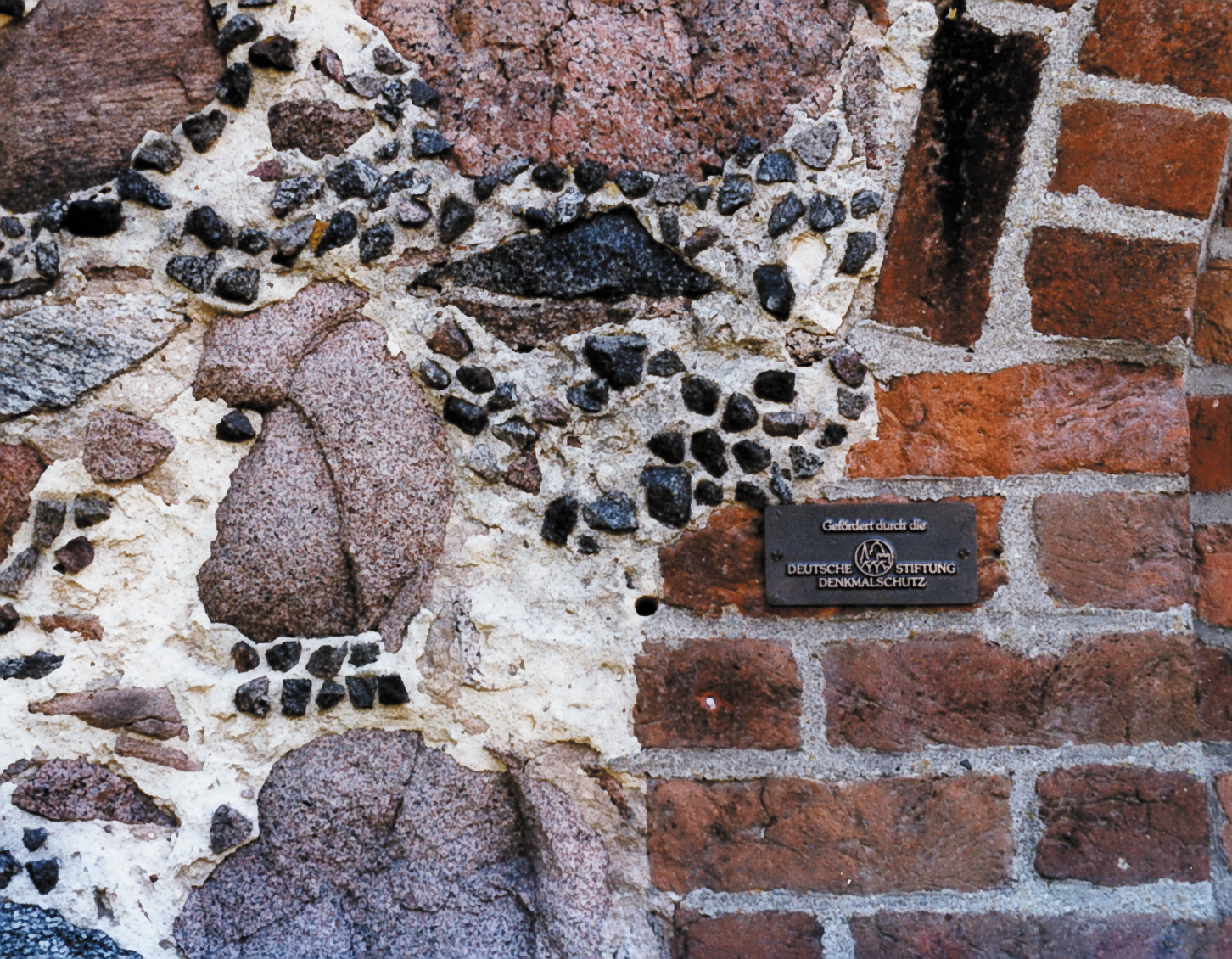 Baumaterialien der Dorfkirche in Vipperow (Mecklenburg-Vorpommern)